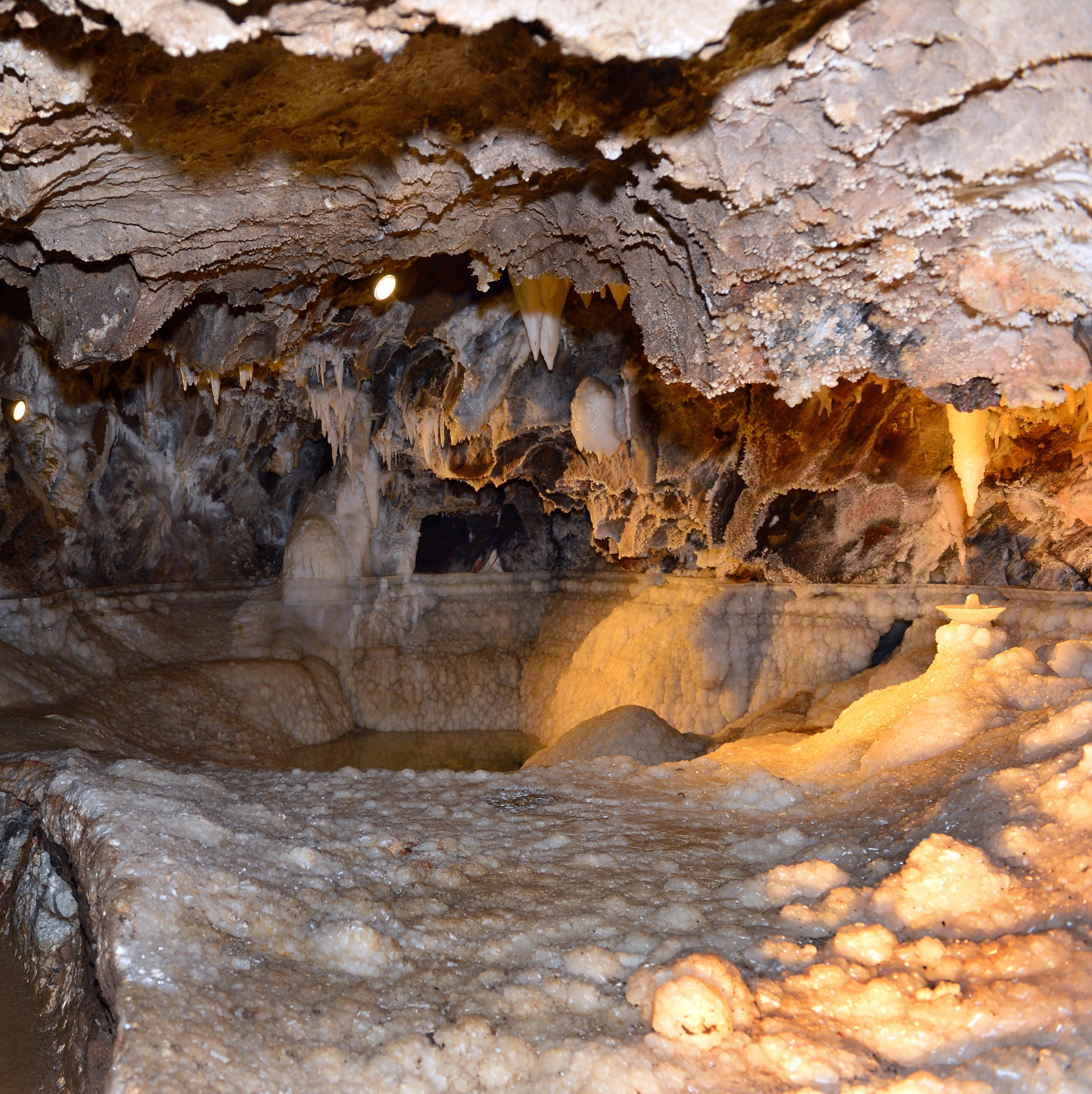 14.10.02 Gruta de las Maravillas 2